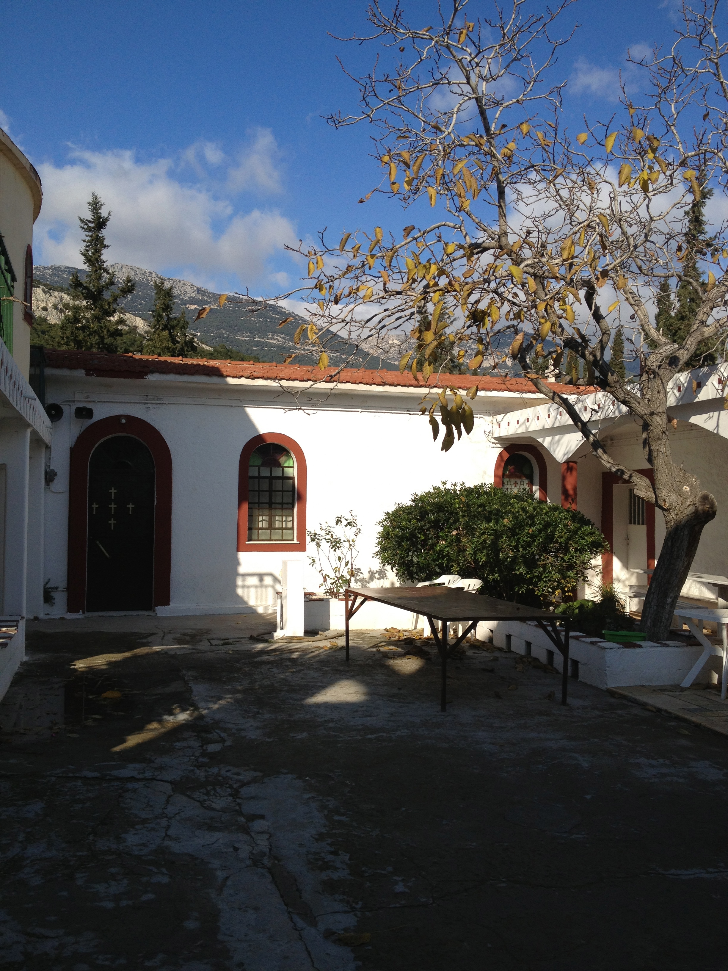 Женский монастырь св. Параскевы в Ахарнес, в Аттике